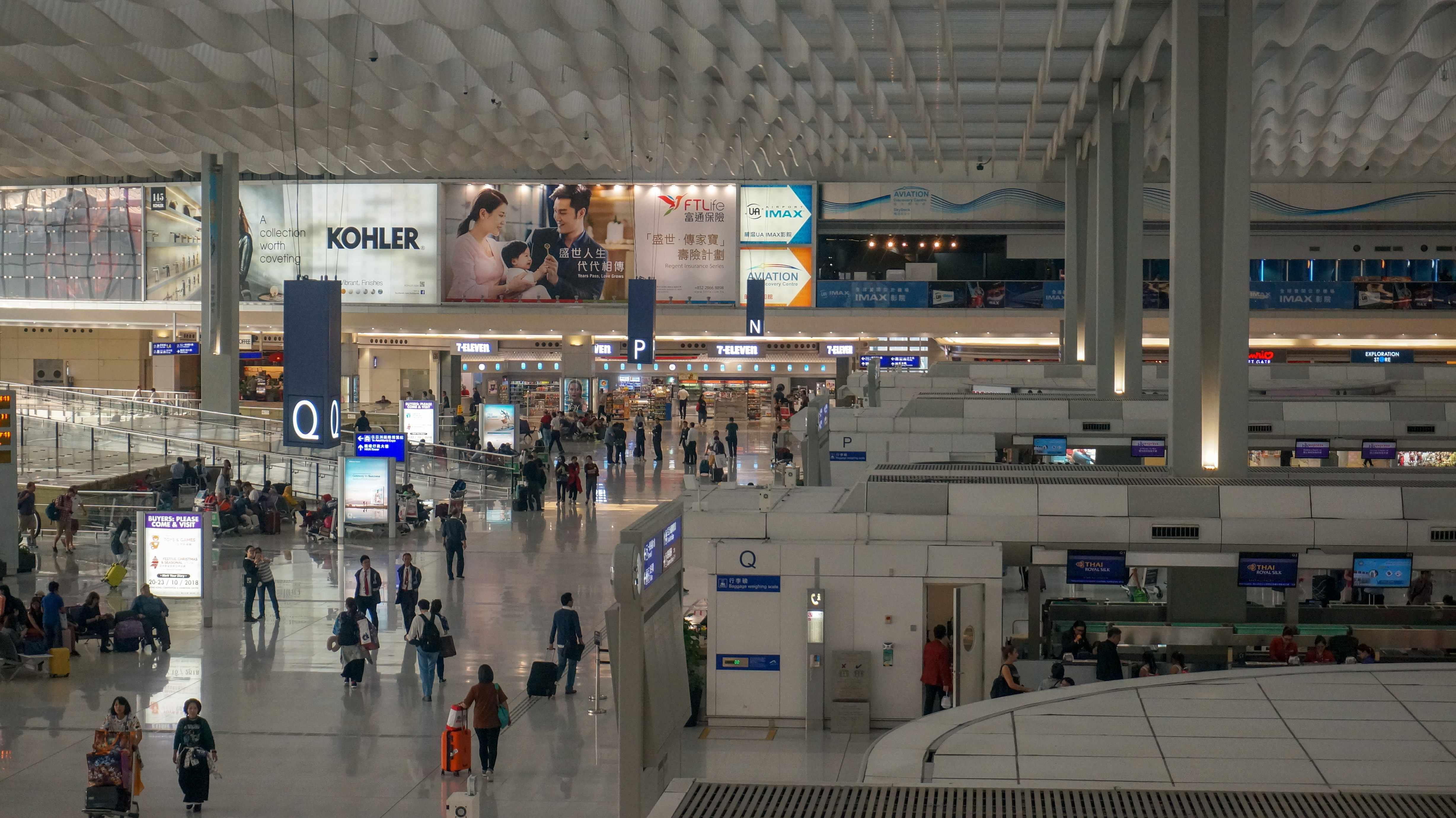 香港國際機場二號客運大樓的離港大堂